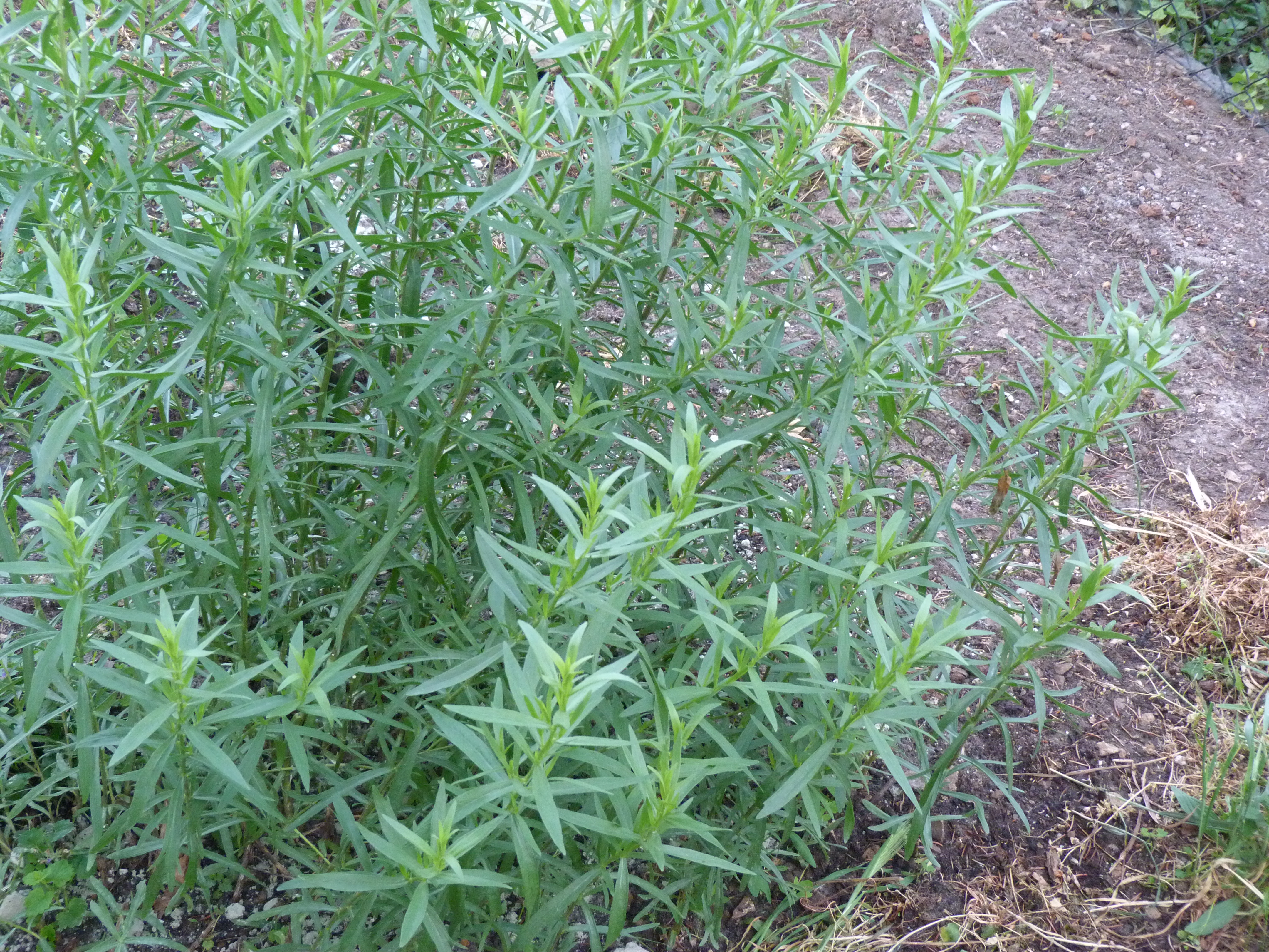 Tárkony. A felvétel 2012. május 9 –én, szerdán készült Budapesten, Budán. Megjelent Creative Commons alatt a Metapolisz DVD sorozatban. Published under Creative Commons in the Metapolisz DVD line.